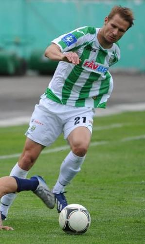 Грегор Балажиц у складі Карпат